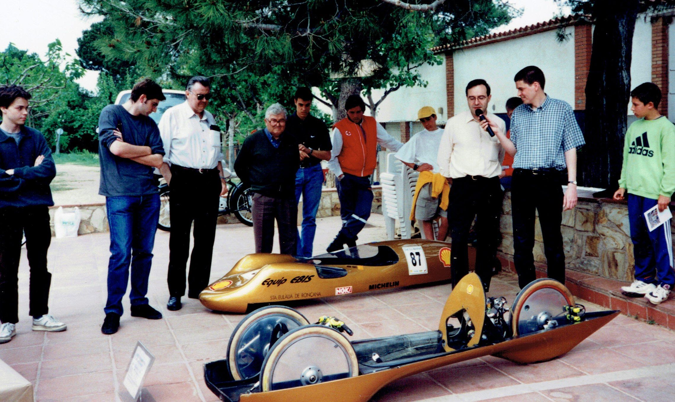 L'any 1899 el senyor Camille Jenatzy superà els 100 km/h per primera vegada en la història. ho va fer amb un vehicle elèctric. Exactament 100 anys després (1999) a Sant Cugat del Vallès (Catalunya) es va voler retre homenatge aquesta efemèride. Patrick Renau, fundador de l'associació catalana promotora del vehicle elèctric Volt-Tour, organitzà l'acte.